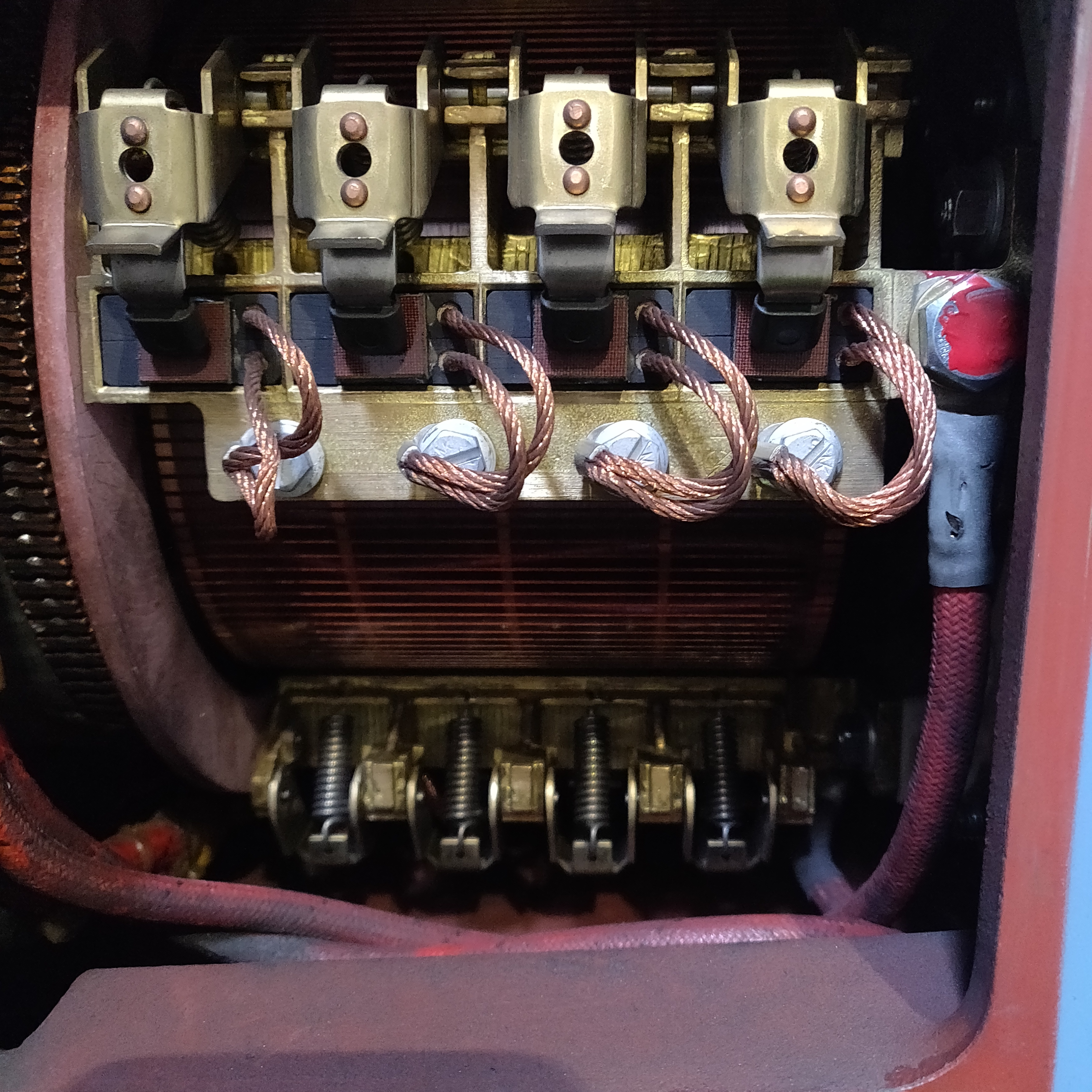 Mootori harjad ja kommutaator DC mootoris